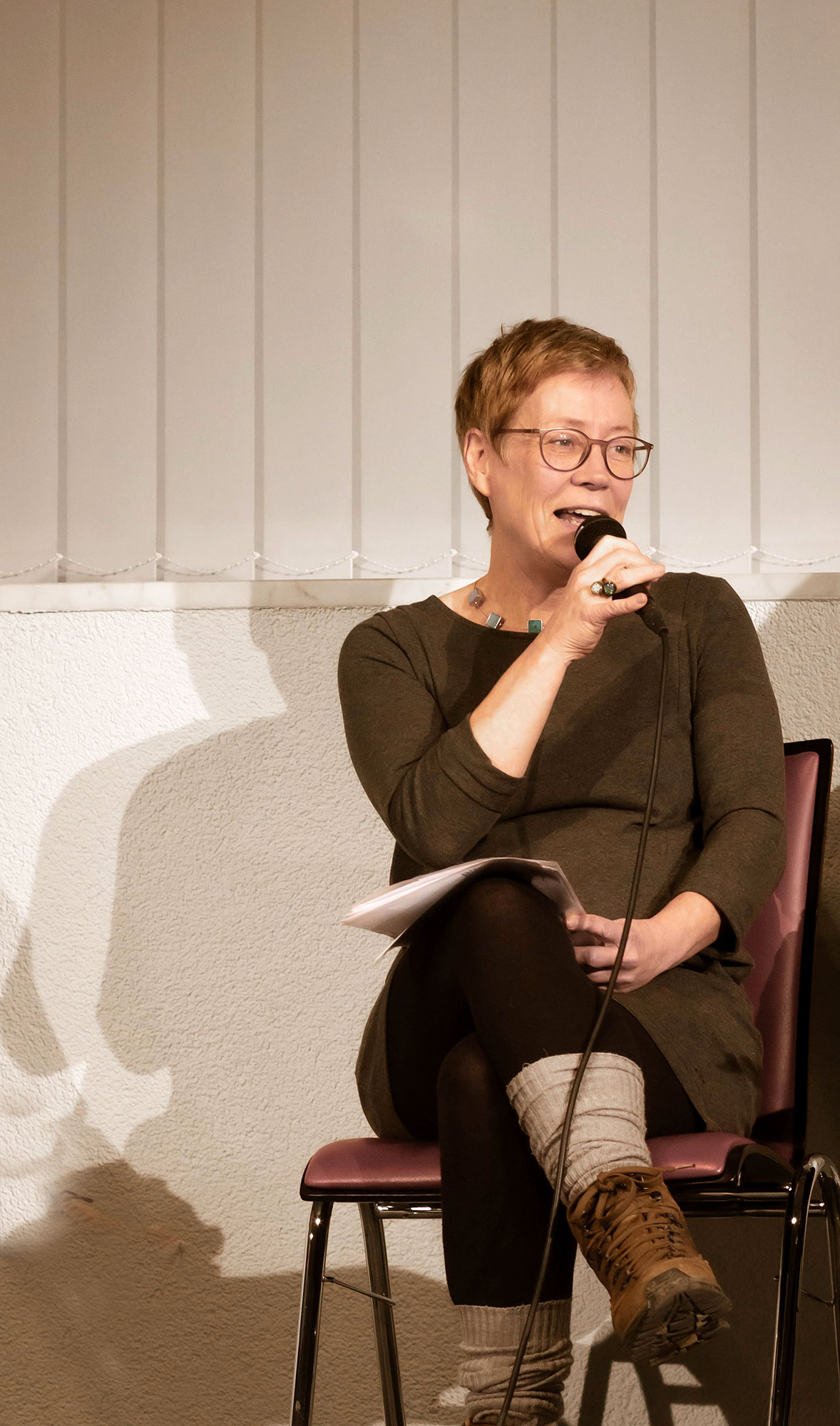 Gina Mayer am 21.Januar 2020 in der Zentralbibliothek Düsseldorf.